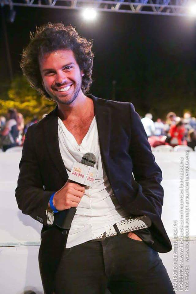 Matías Vázquez en el evento Moda Look Pinamar 2015